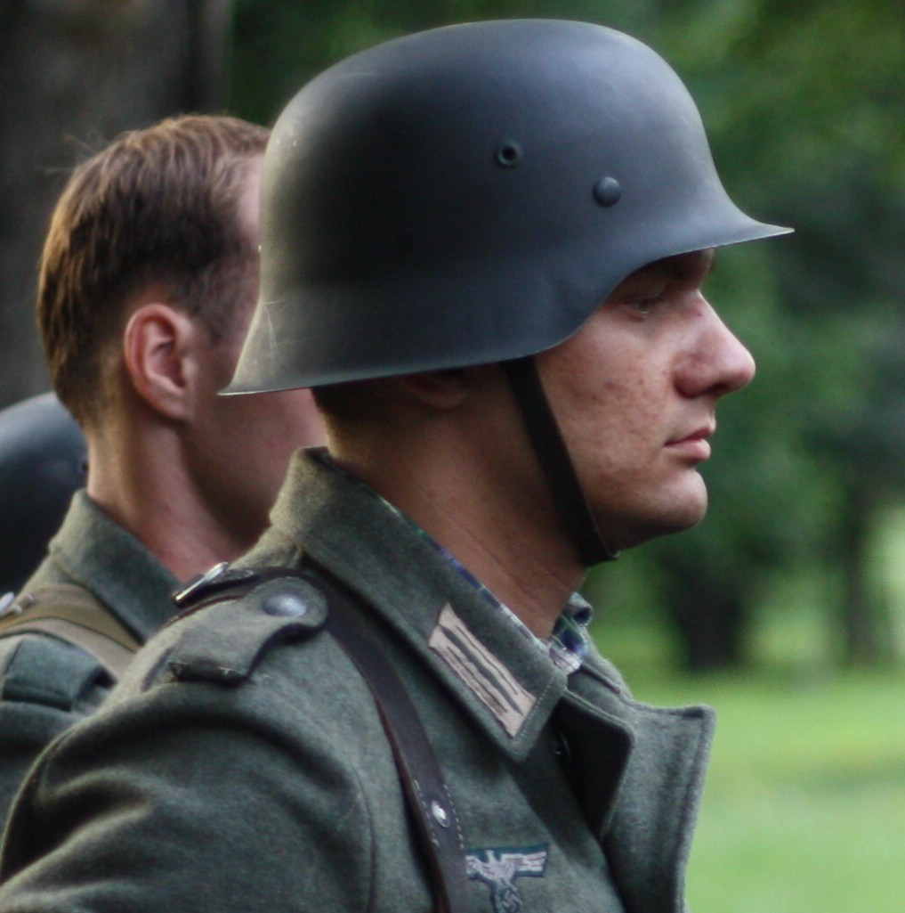 シュタールヘルム